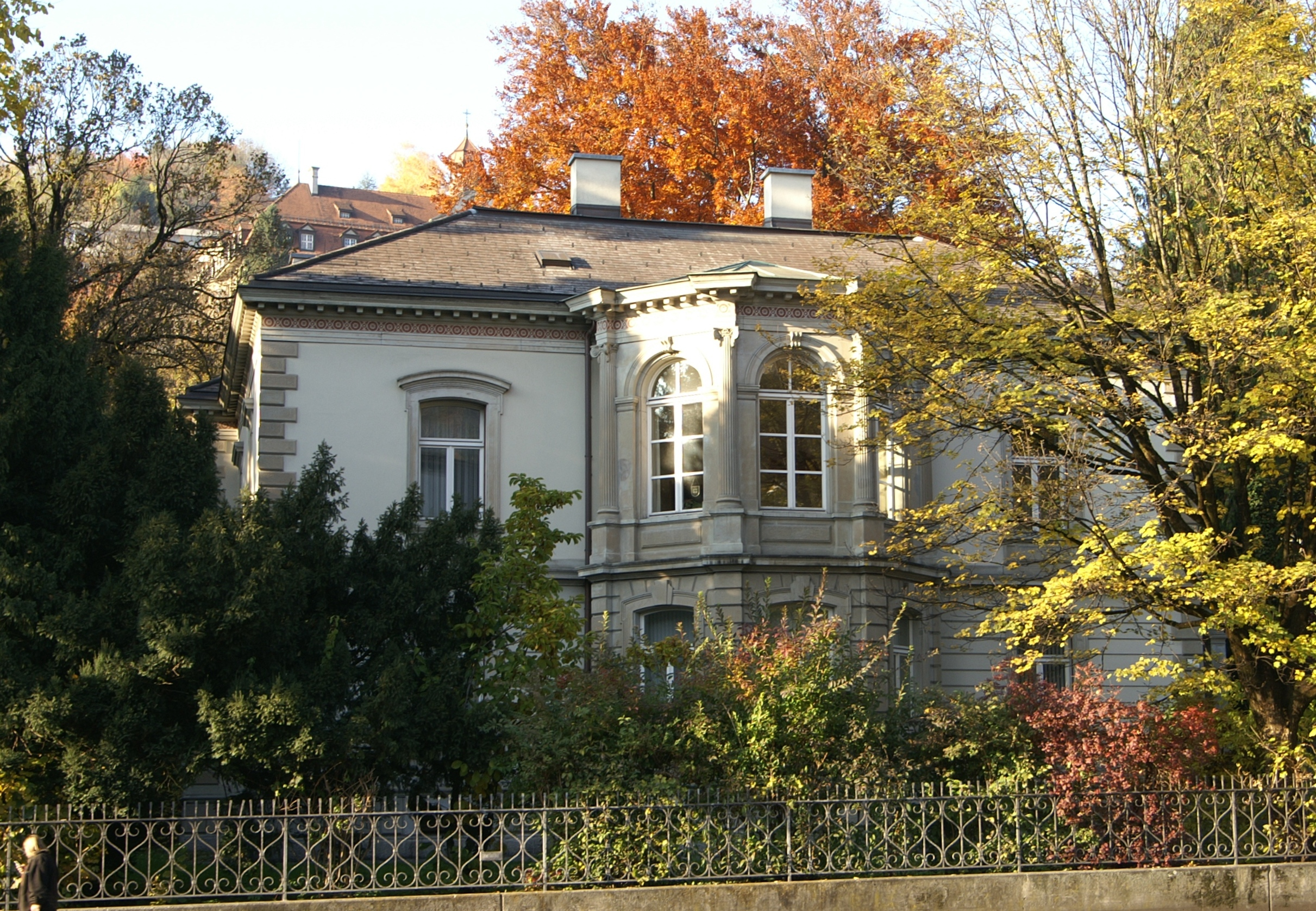 Bischofsvilla am Hirschgraben 2 in Feldkirch, Vorarlberg.